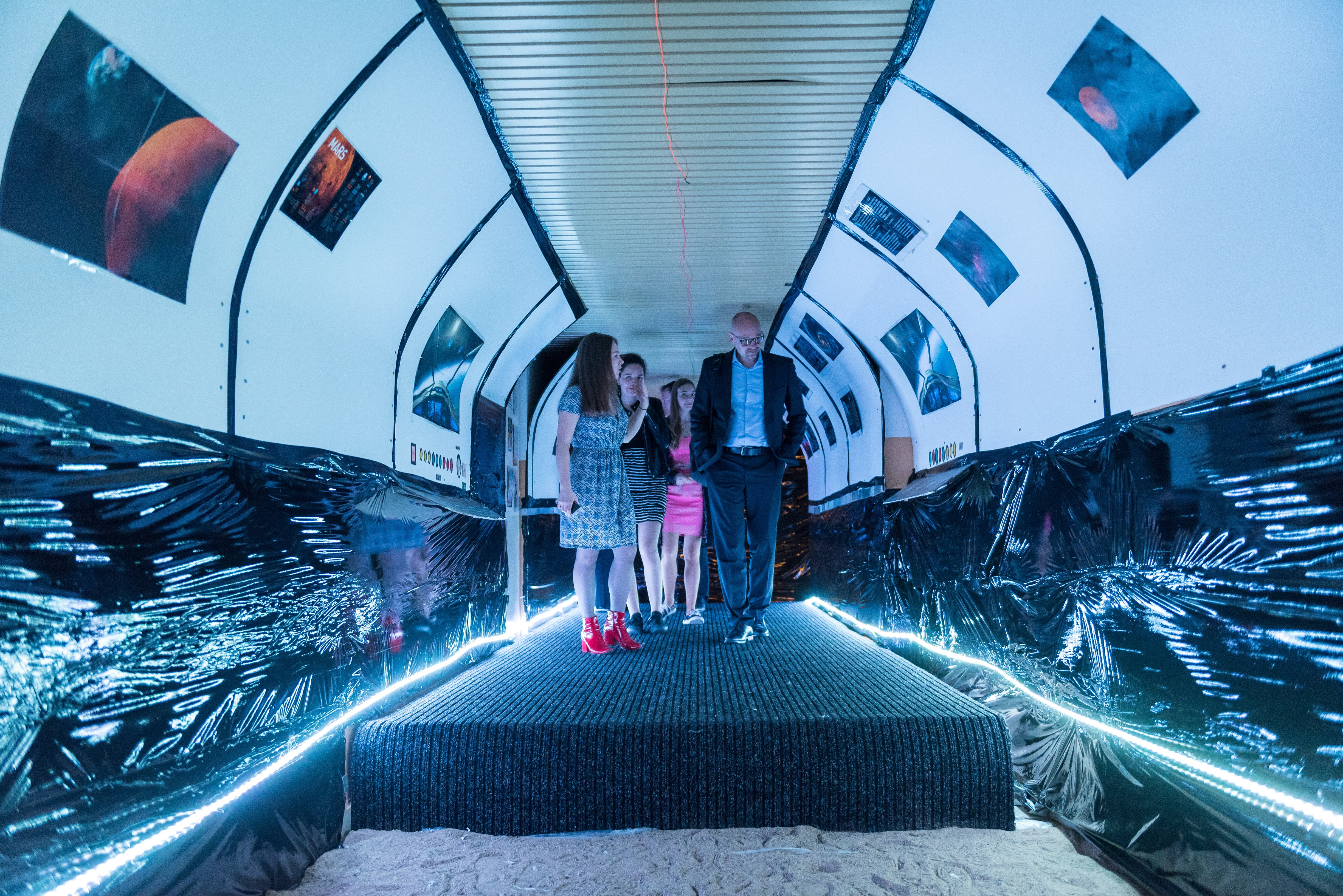 Studenti v projektu postavili vesmírnou loď a pracovali na projektech, které simulovali opravdový život na Marsu.